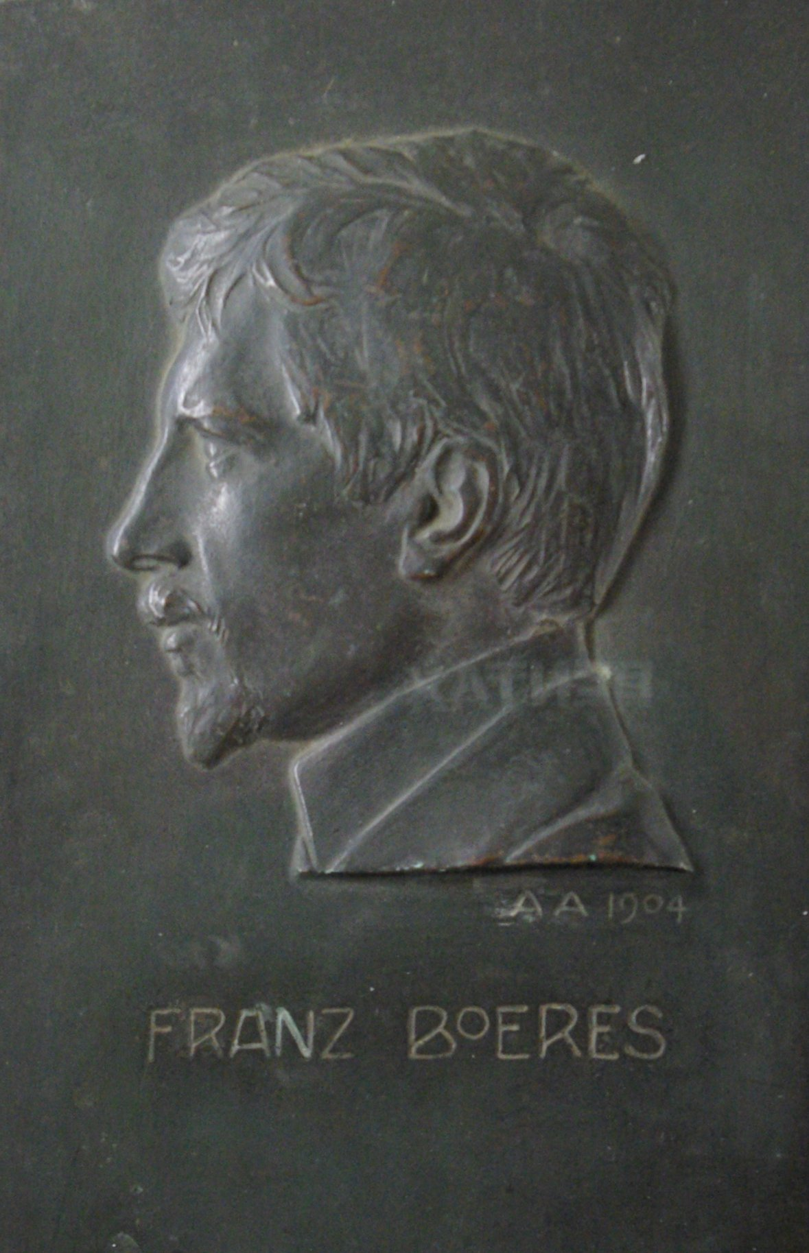 Portrait Franz Boeres, Bronze von Max Audorf